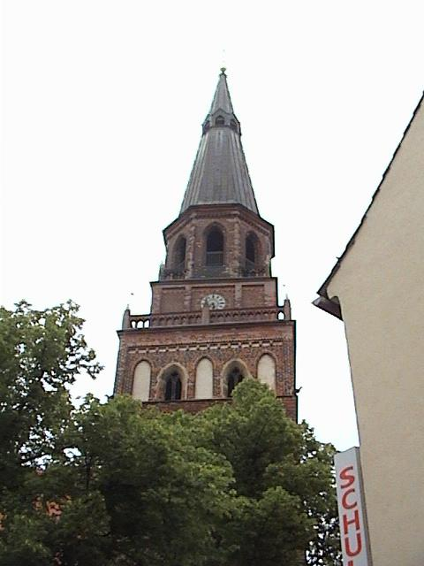 Stadtkirche „St. Marien“